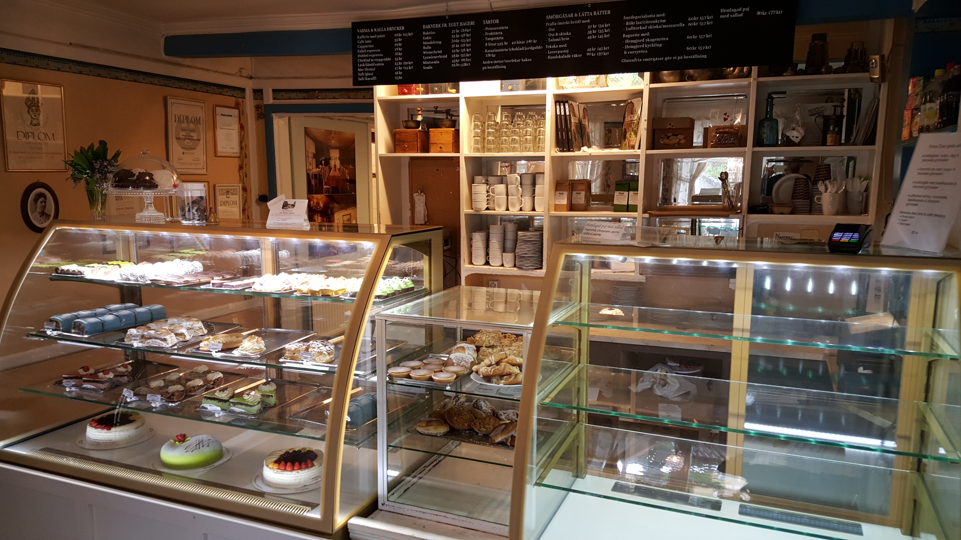 Elsa Anderssons konditori interiör